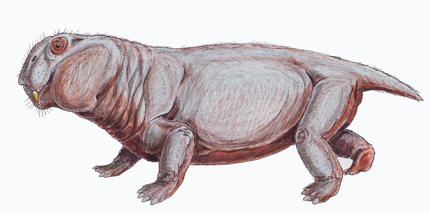 Lystrosaurus murray